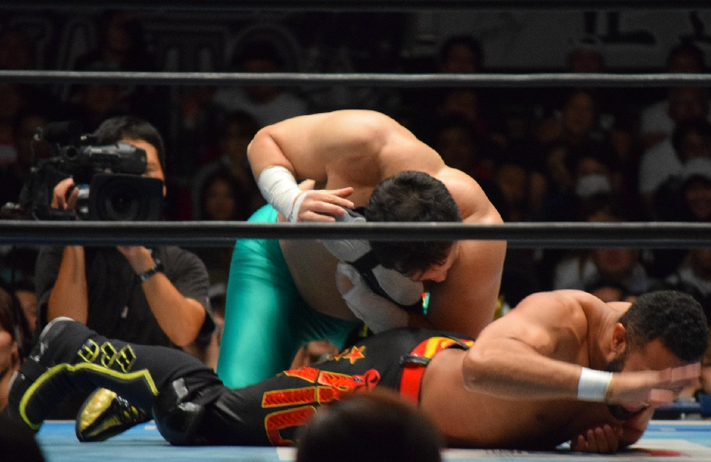 2016年9月25日 ワールド記念ホール「DESTRUCTION in KOBE」 ロッキー・ロメロにオーマイ&ガーアンクルを極める田口隆祐